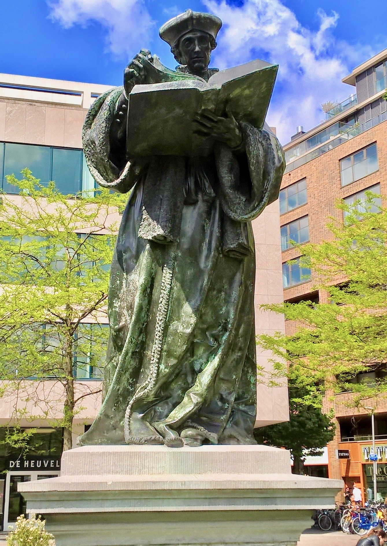 Statue d'Ersamus Rotterdamus, ville de Rotterdam.